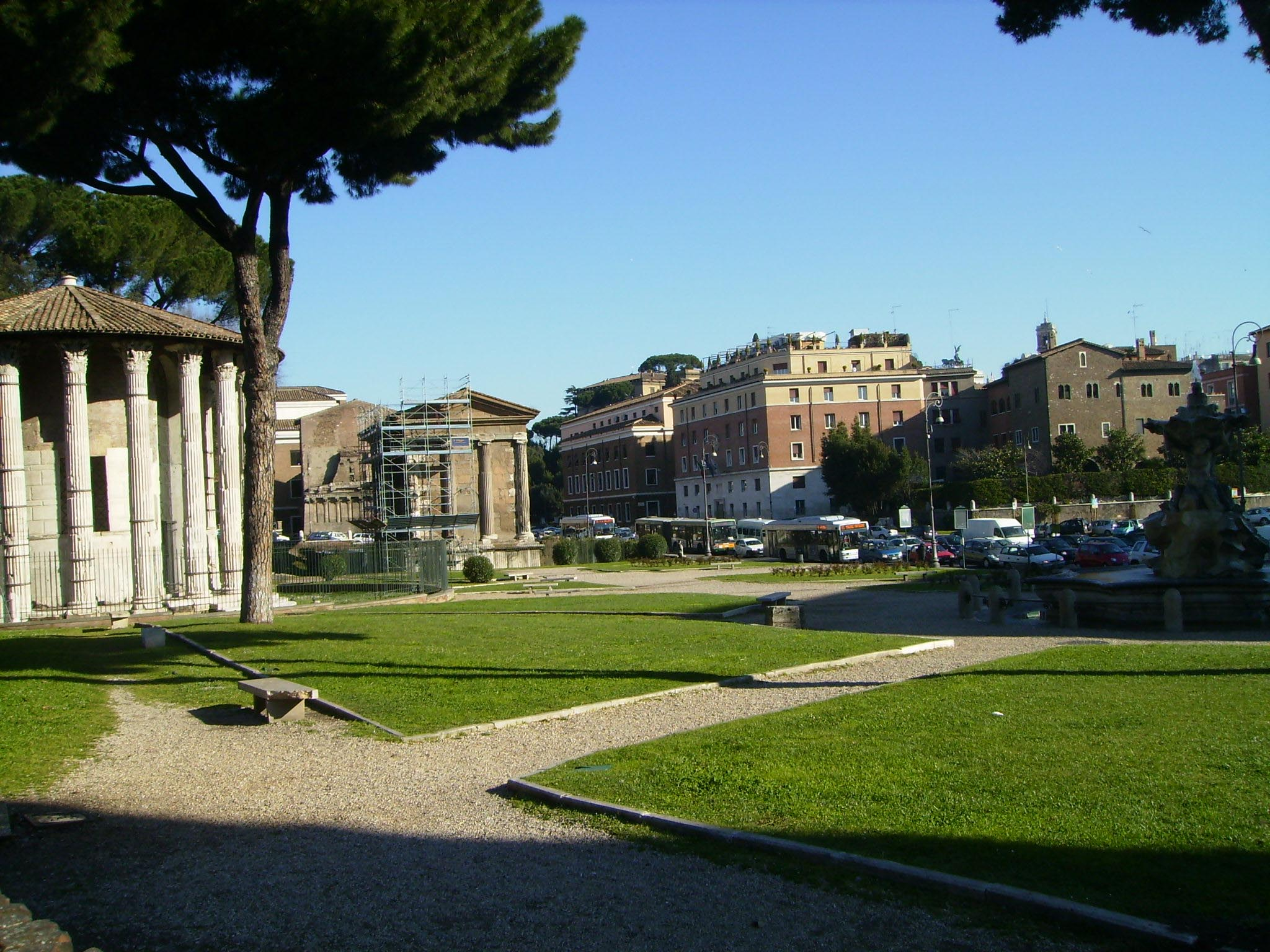 Vue générale du jardin public sur l'ancien site du Forum Boarium. On y voit (de gauche à droite): le temple d'Hercule Vainqueur, le temple de Portunus et la fontaine des Tritons (Rome, Latium, Italie).